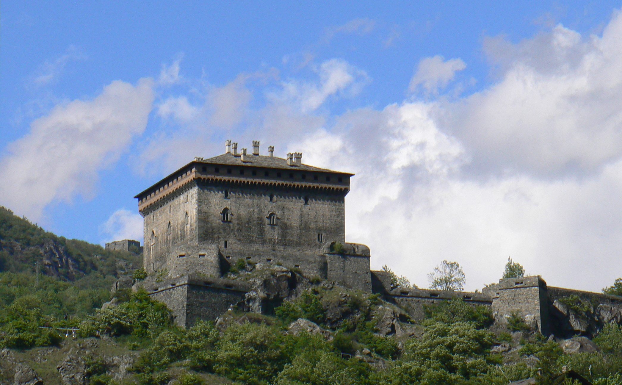 Castello di Verrès in contatto visivo con il castello di Villa a scopo difensivo. This is a photo of a monument which is part of cultural heritage of Italy.